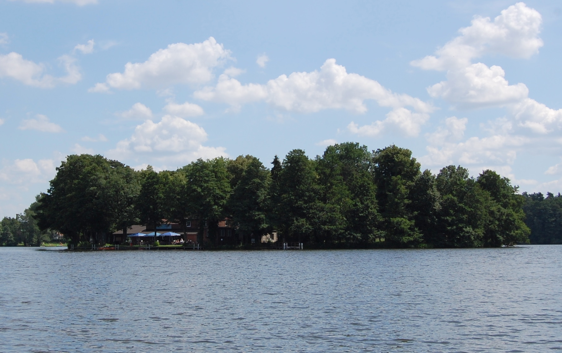 Unterseeinsel im Untersee